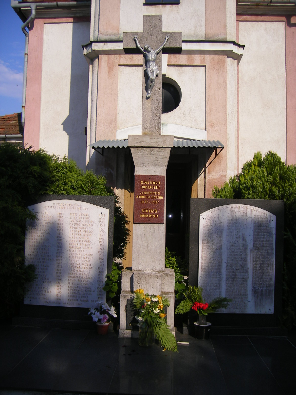 Szímő - a két világháború és a kitelepítések áldozatainak emlékműve a Szent Márton templom előtt